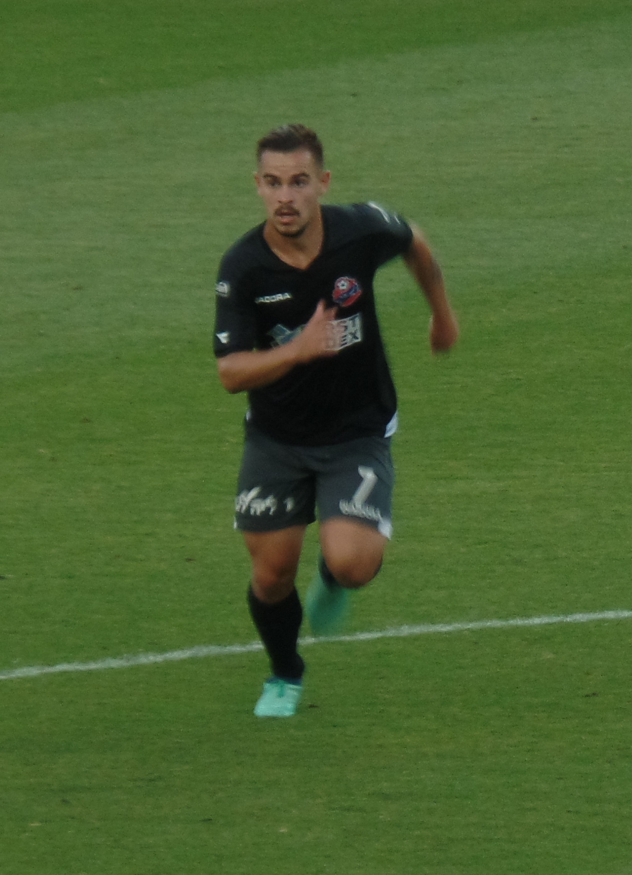 Maxim Plakuschenko 2018